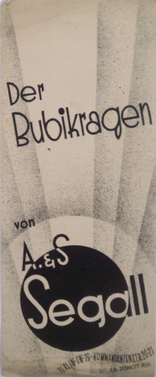 Der Bubikragen von A. & S. Segall, Berlin SW-19, Kommandantenstraße 20-27. Prospekt, 11,2 x 27 cm (gefaltet) Auf dem Werbeprospekt "Der Bubikragen" der Firma "A. & S Segall" ist in einem Kreissegment unten der Name der Firma angegeben. Darunter befinden sich die Kontaktdaten. Im Hintergrund verlaufen strahlenförmige Segmente nach oben und in die linke und rechte Kartenhälfte. Auf der aufgeklappten Innenseite sind auf jeder der vier Seiten je drei Frauenportäts (Frauenbüste mit Pelz). Daneben befindet sich die Modellbezeichnung und untereinander gereihten Angaben, in welchen Varianten das Modell und für welchen Preis erworben werden kann. Die Druckfarbe ist schwarz.